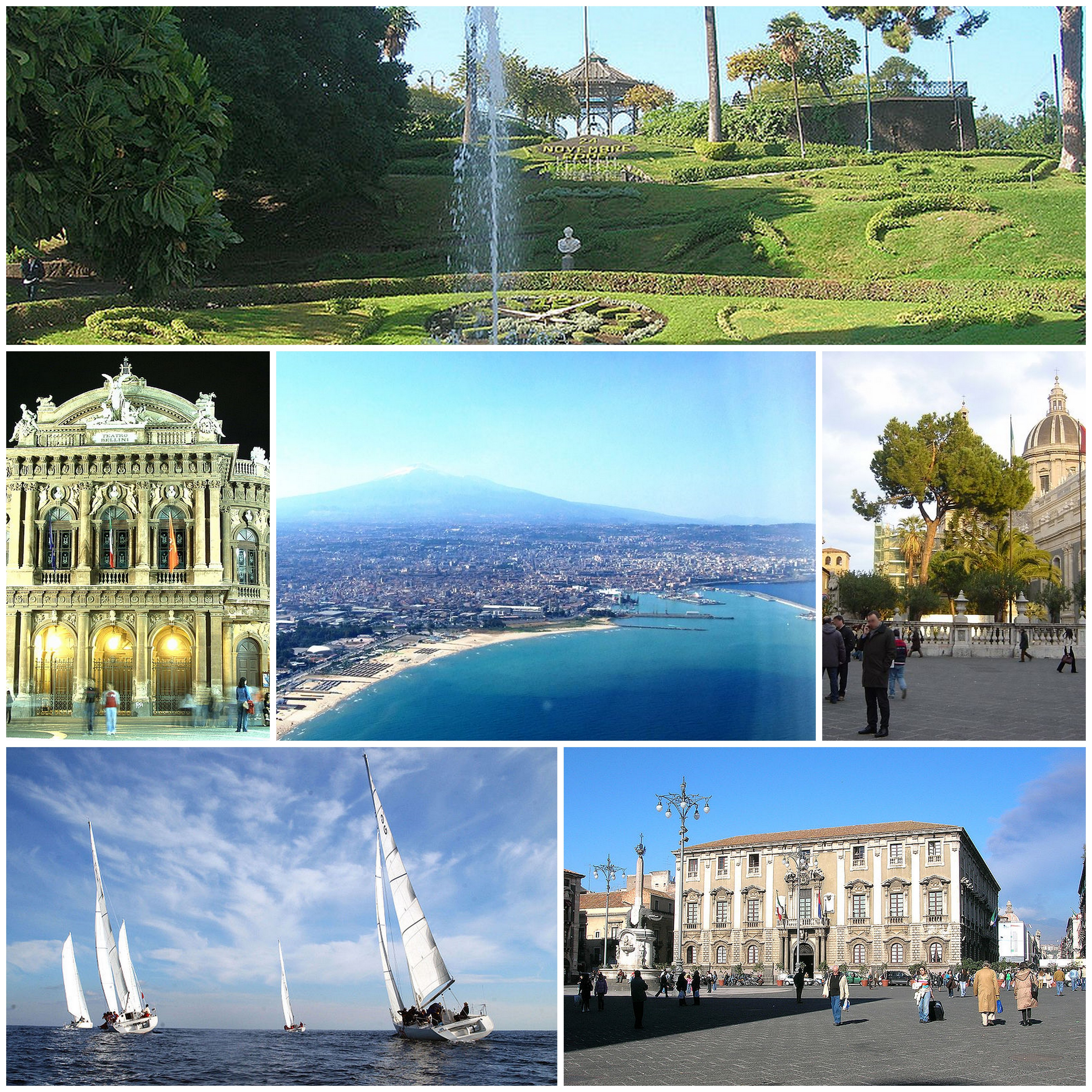 Collage di varie foto di Catania